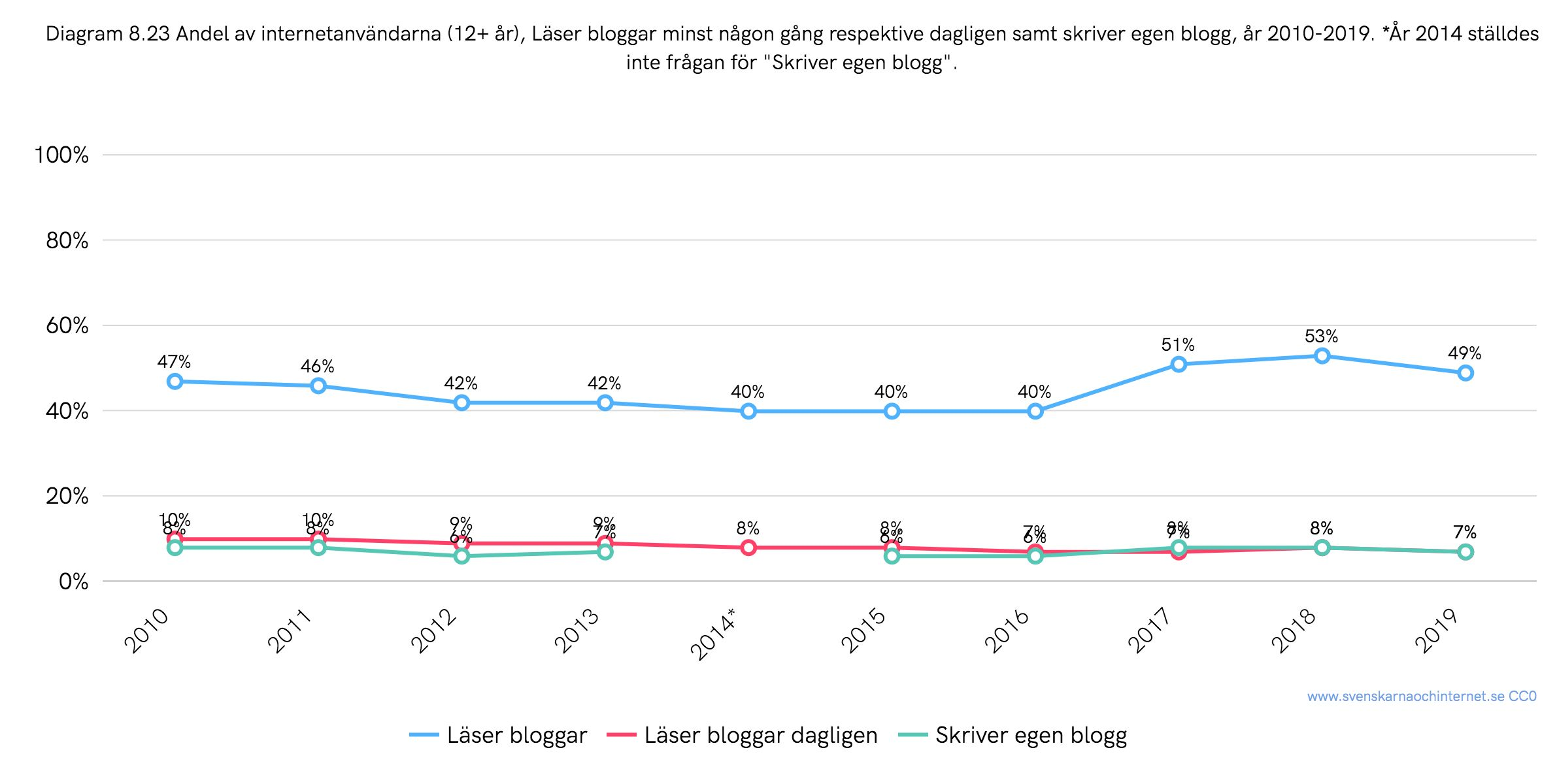 Andel av de svenska internetanvändarna (12+ år) som läser bloggar minst någon gång respektive dagligen, samt skriver egen blogg, år 2010–2019. År 2014 ställdes inte frågan för "Skriver egen blogg". Siffror från undersökningen "Svenskarna och internet".